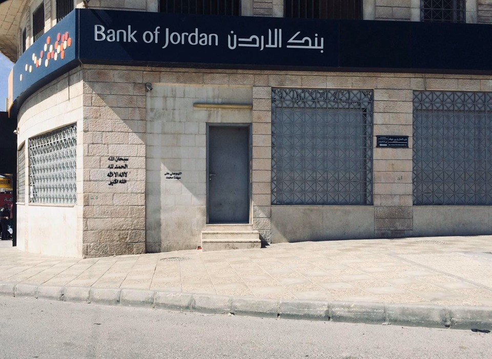 صورة لأحد فروع بنك الأردن في العاصمة عمان